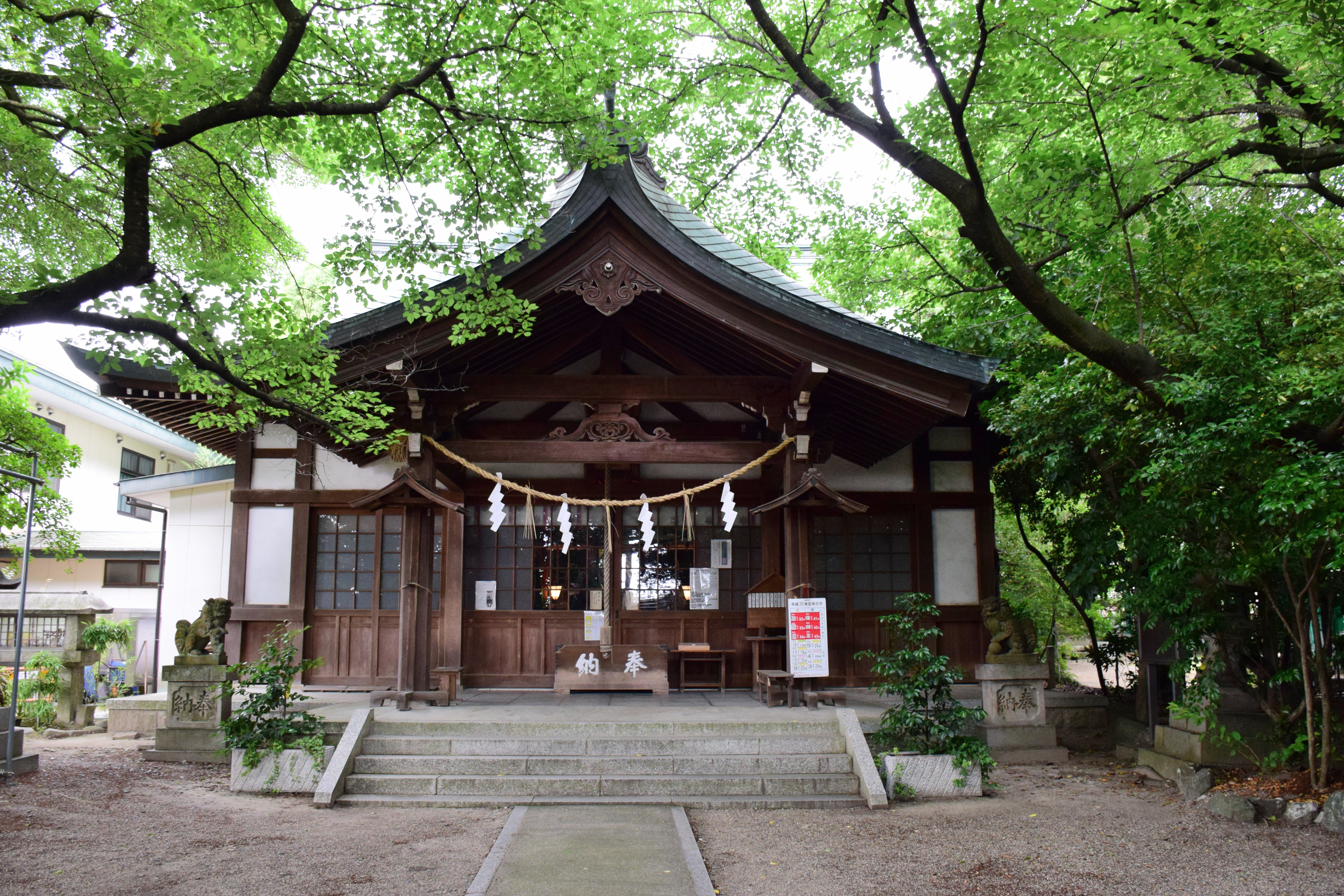 萱津神社拝殿